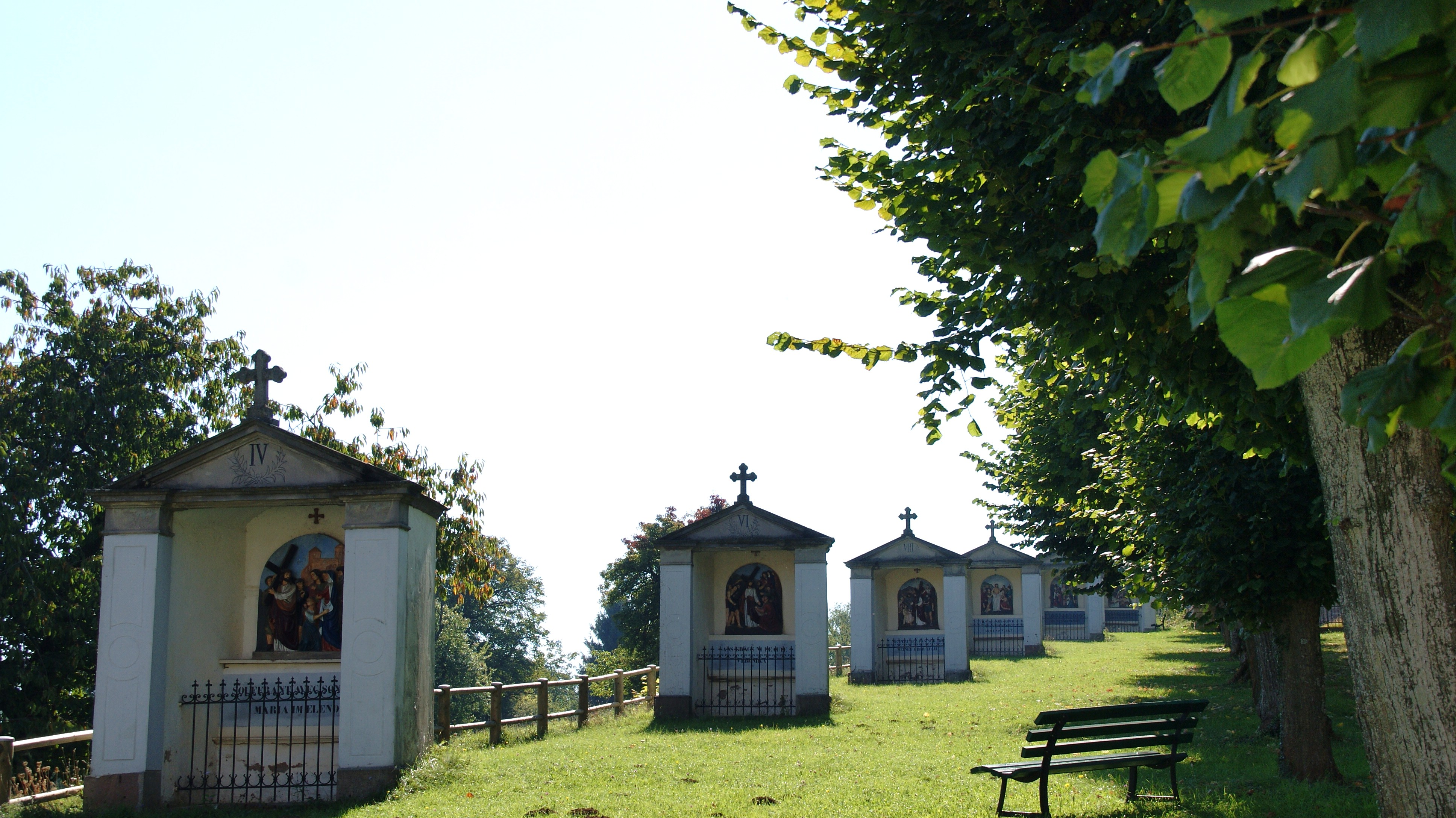 Bischenberg_Chemin-de-Croix_Vue-Partielle_01